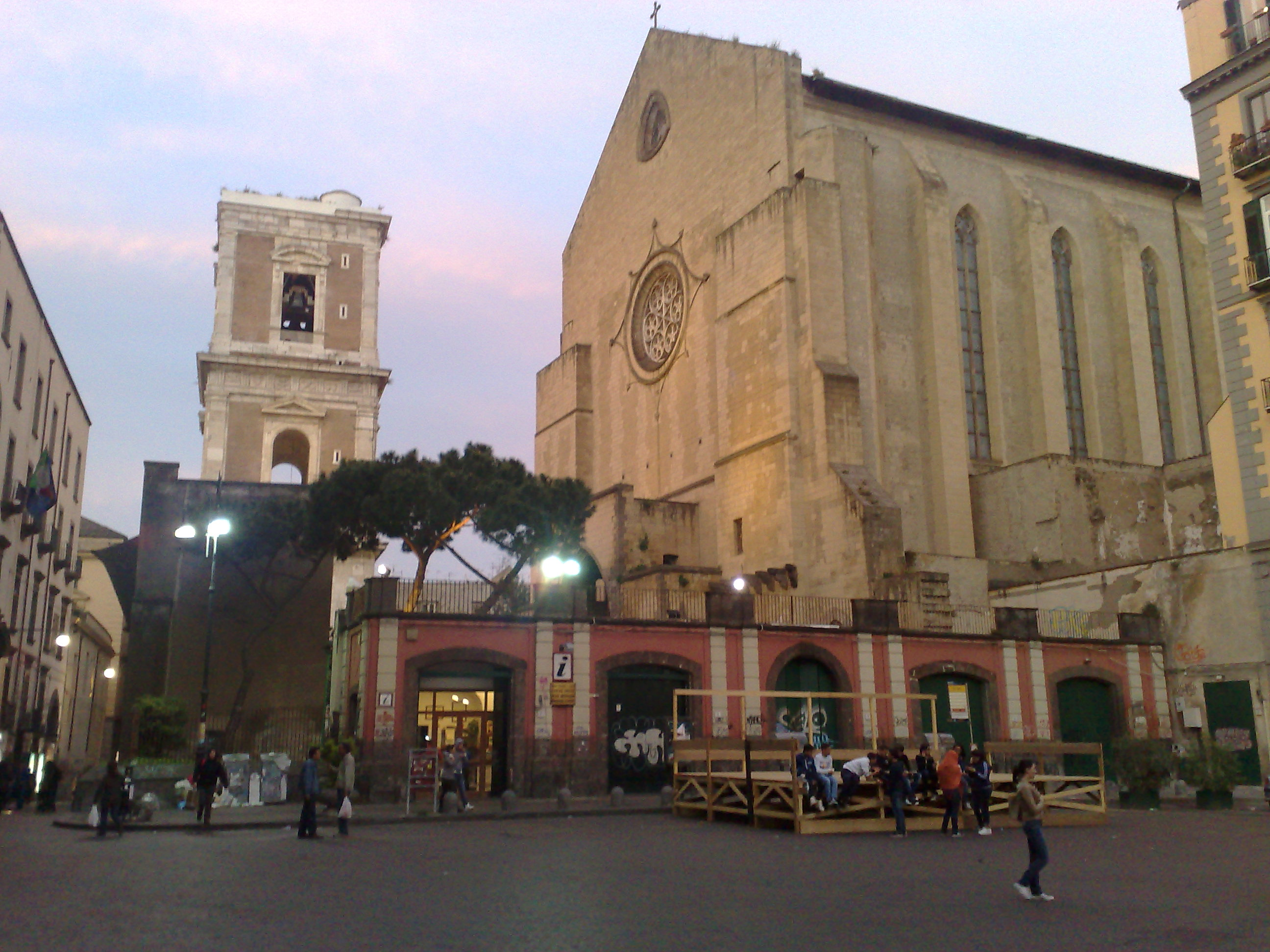 Monastero di Santa Chiara da Piazza del Gesù (Napoli)